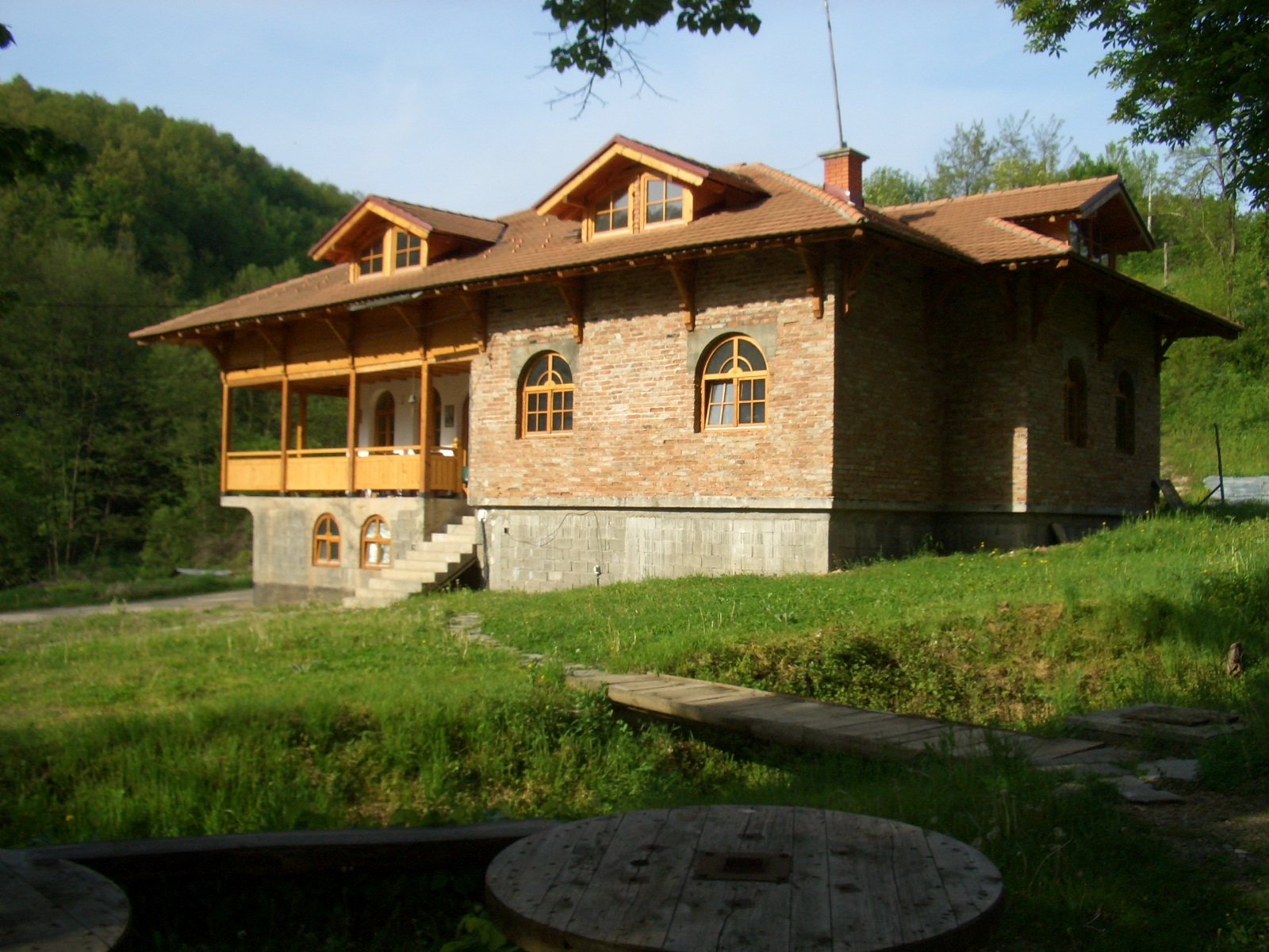 Конак манастира Јежевице.